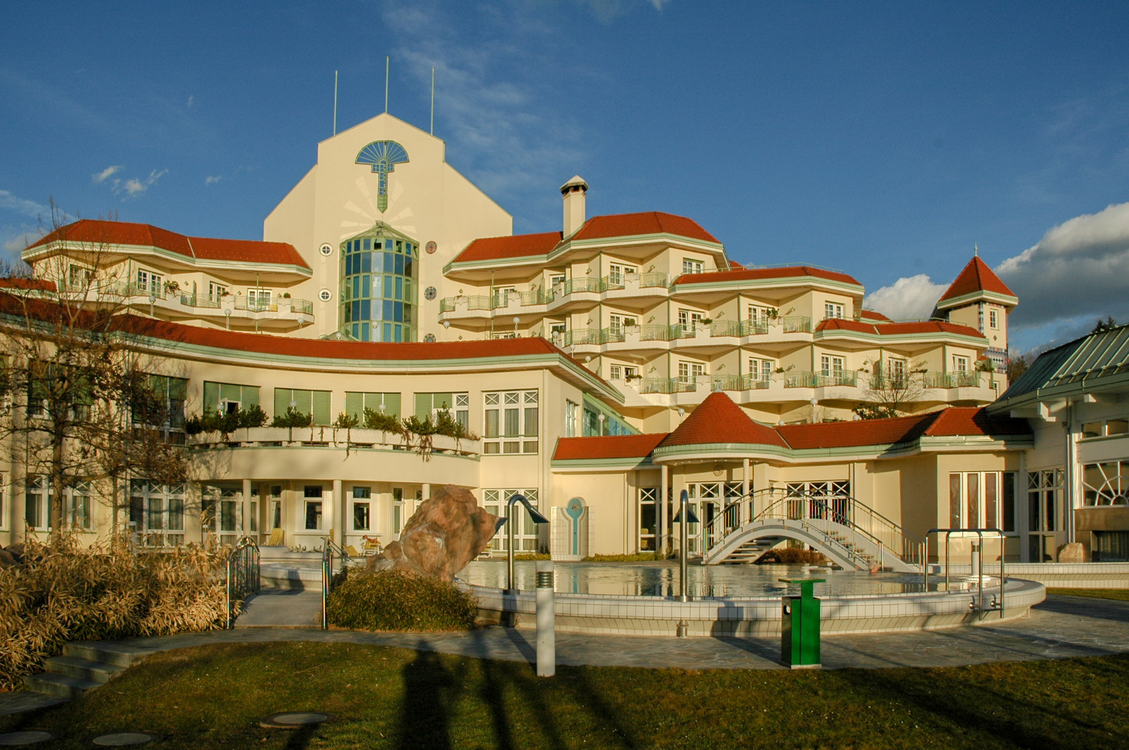 Kur und Thermenhotel Bad Tatzmannsdorf